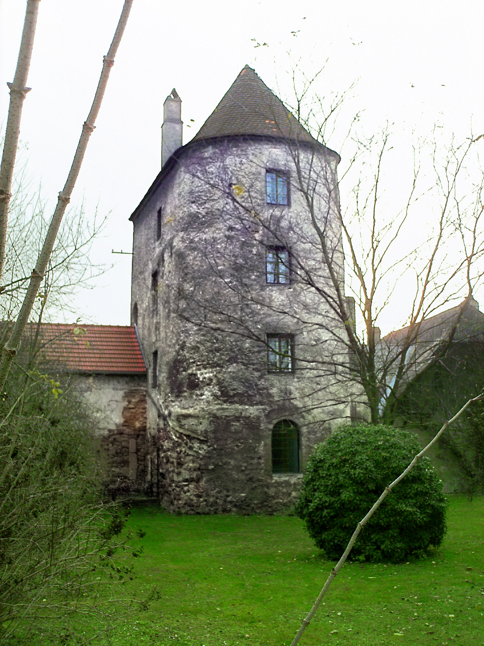 Der Reck- oder Hungerturm in Traismauer, Blick aus Nord